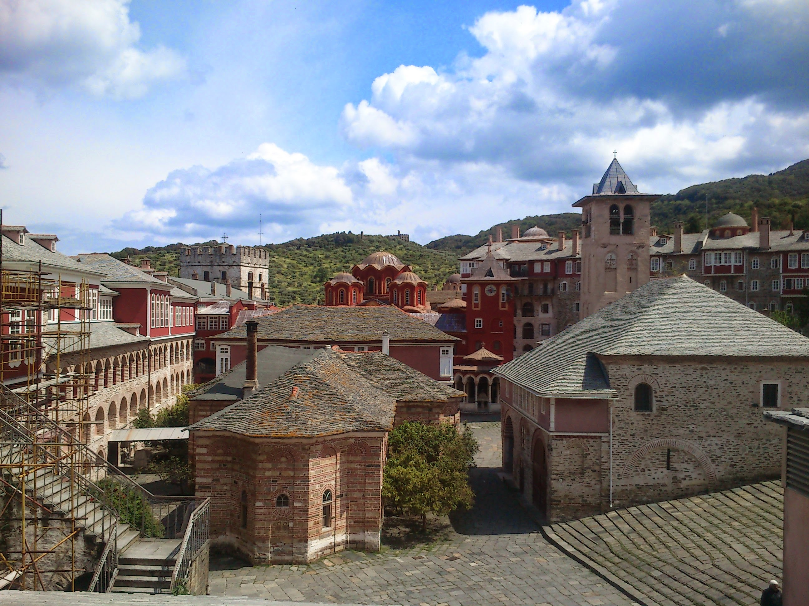 Μονή Βατοπεδίου«Μονή Βατοπεδίου»